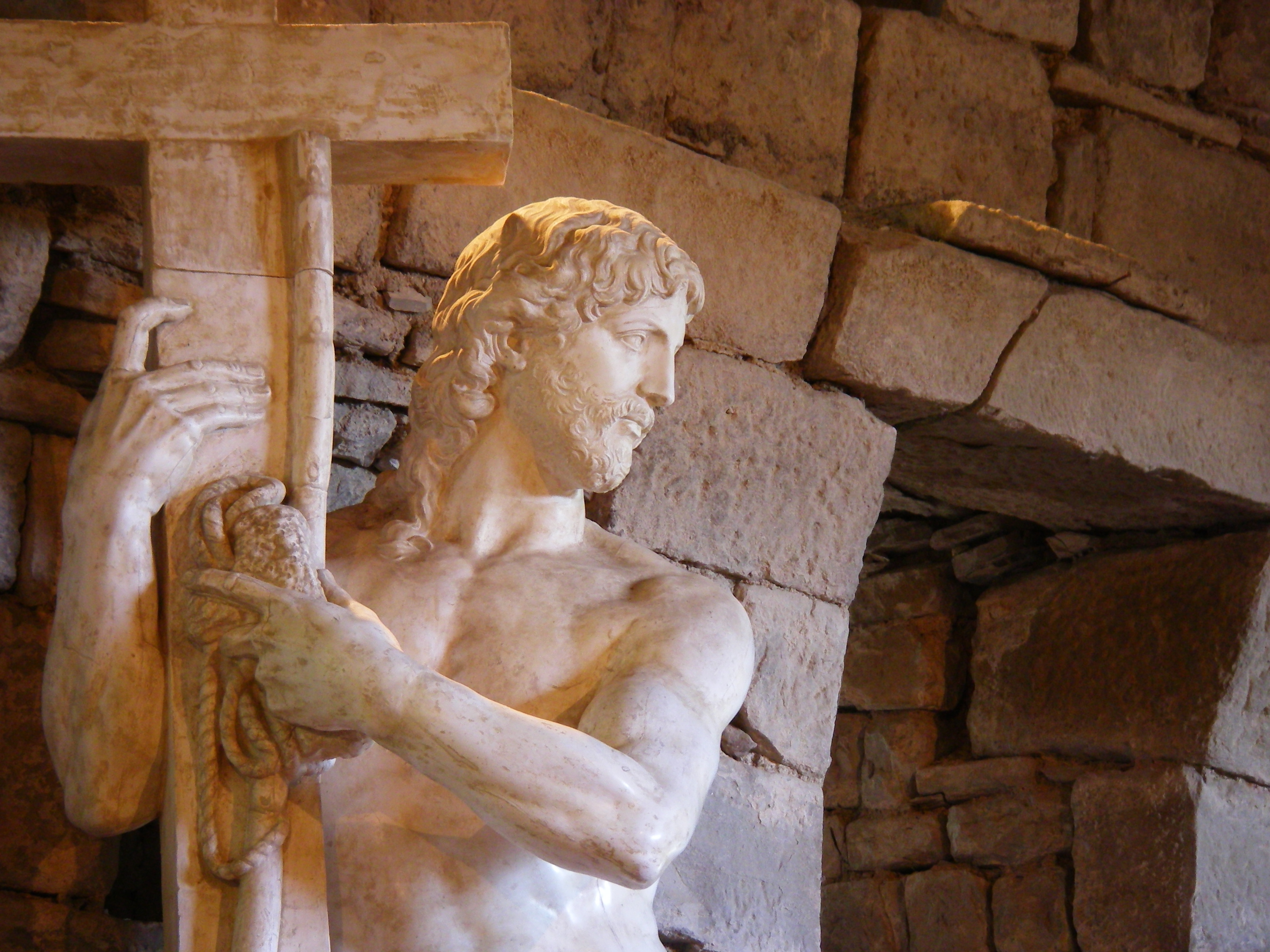 Cristo Risorto, calco in gesso dell'originale di Michelangelo Buonarroti. Particolare. Museo Michelangiolesco, Caprese Michelangelo (AR)